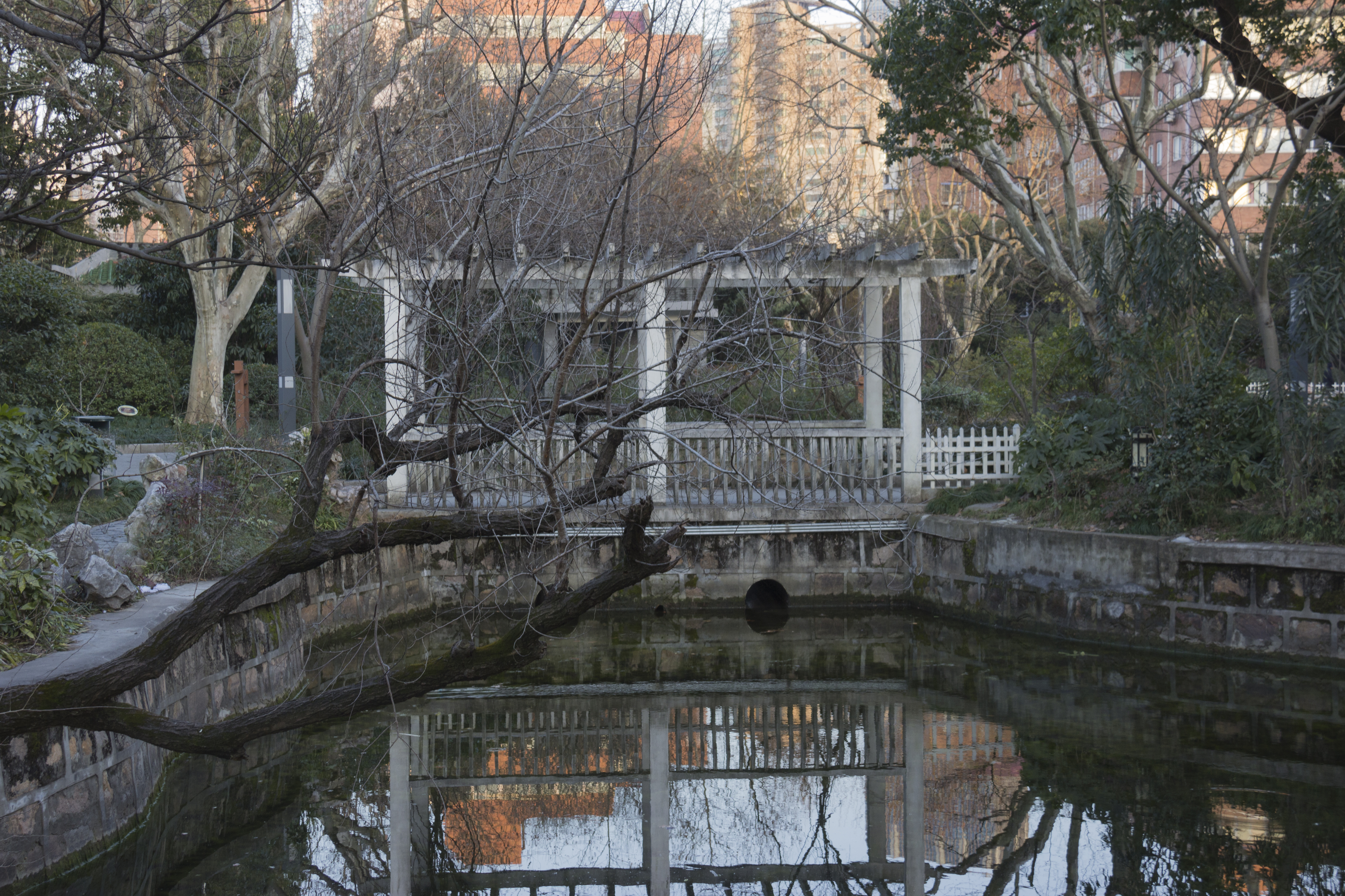 曹杨公园曲池上的平桥